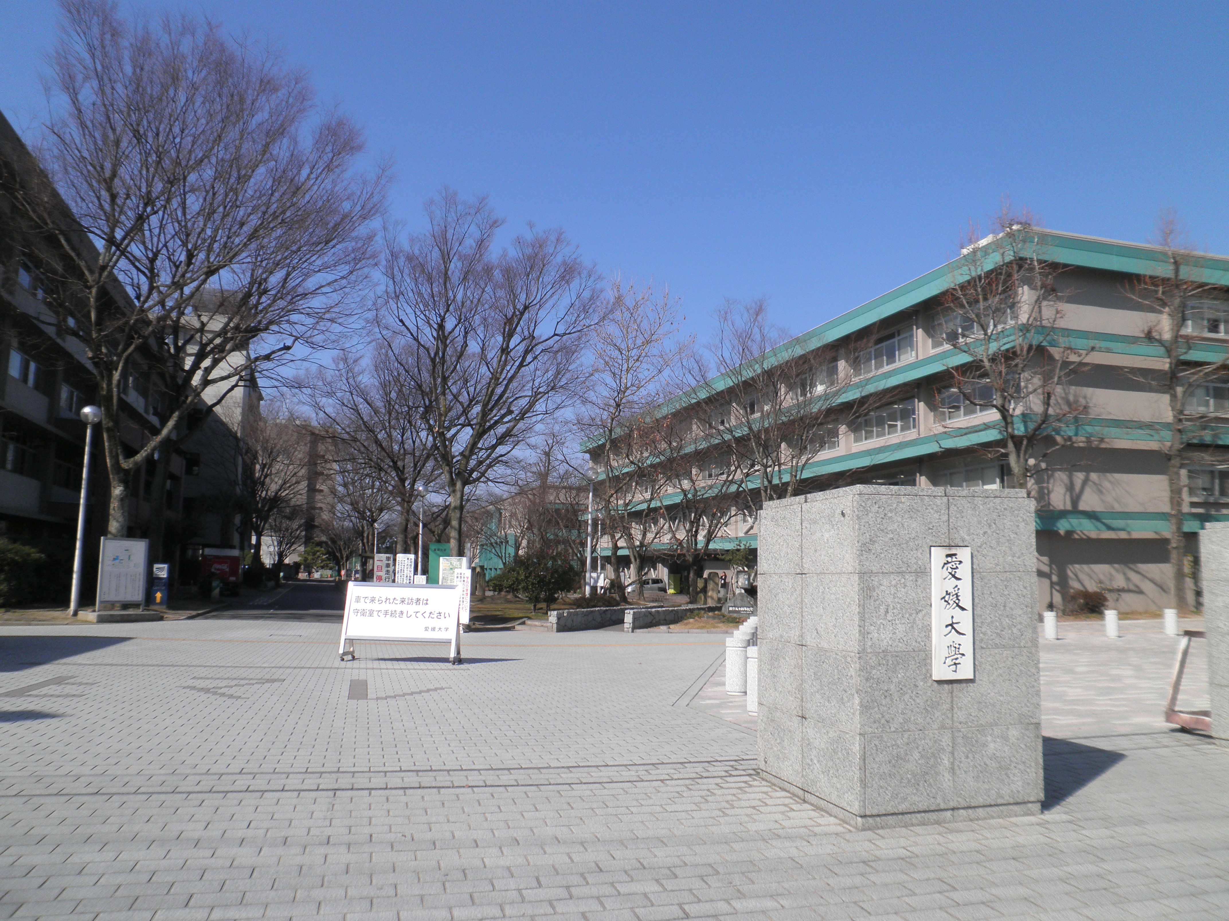 愛媛県松山市にある愛媛大学の正門